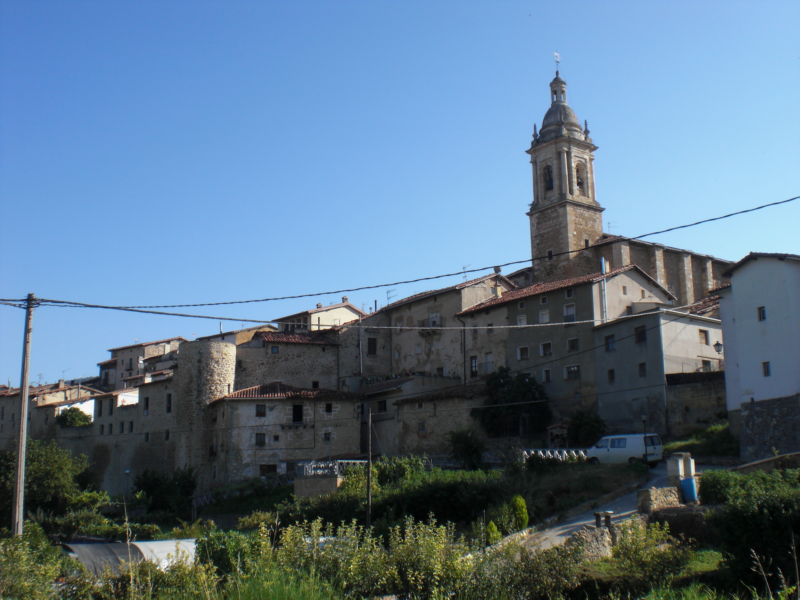 Antoñanako hiribilduaren ikuspegia